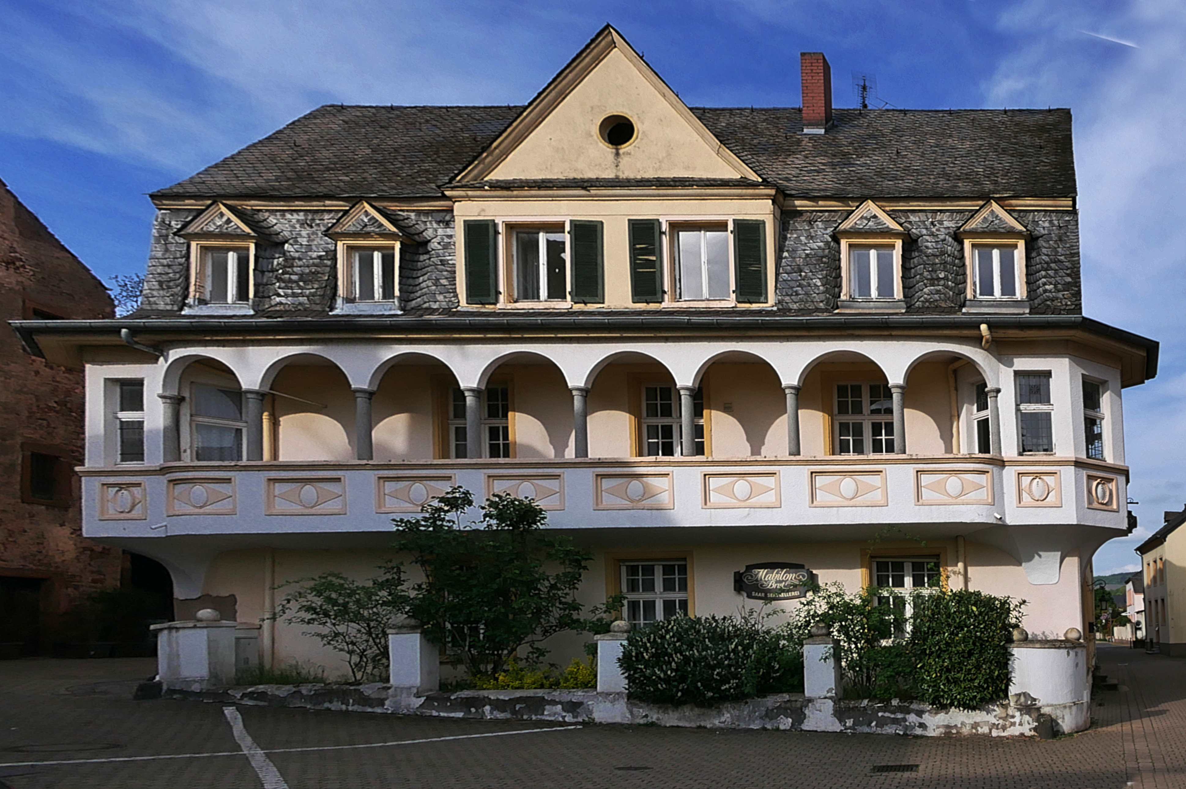 Saarburg (bei Trier) - Haus Mabilon im Ortstei Staden, Haus von Süden mit Arkanden